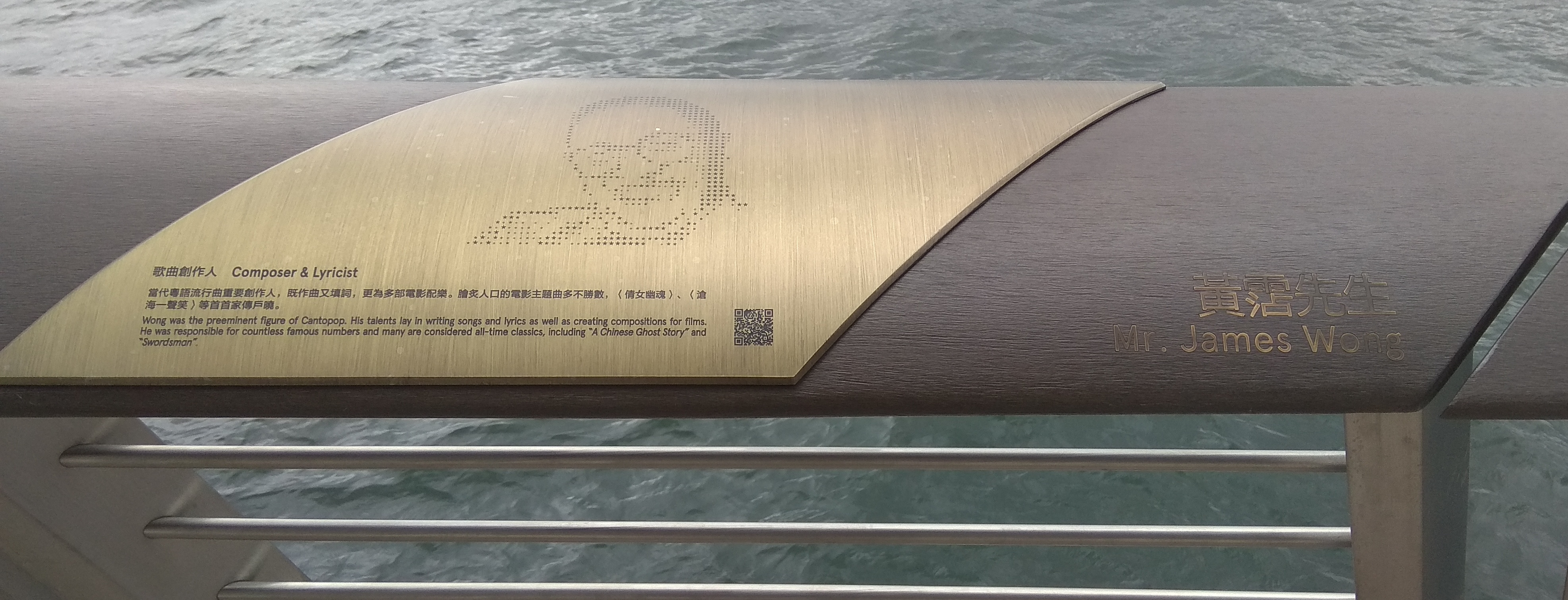 香港尖沙咀星光大道上歌曲創作人黃霑的介紹牌及肖像圖（編號：87）。